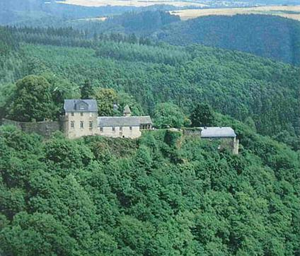 Schloss Schöneck, Boppard (Gemarkung Herschwiesen) im Hunsrück. Im Jahr 1912 erwarb der Maler Wilhelm Steinhausen (1846-1924) die Anlage. Seit 1922 ist sie im Eigentum einer Familienstiftung.